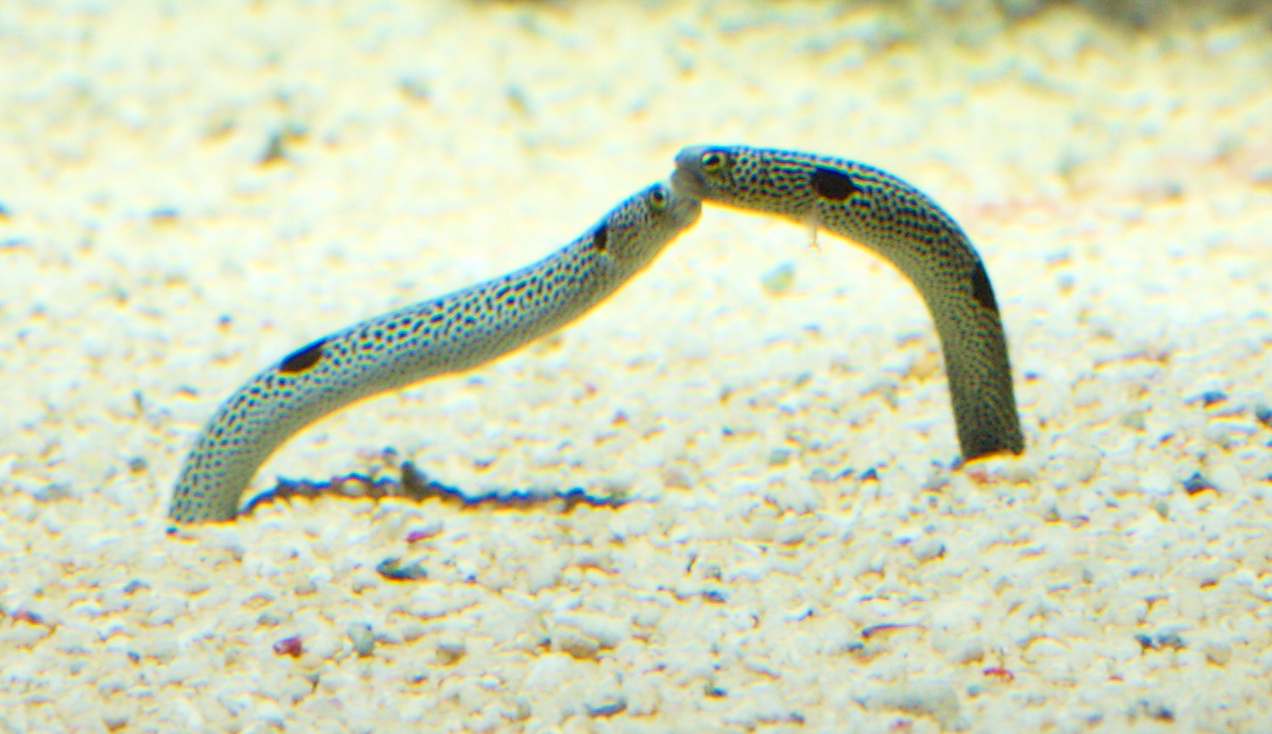 Zwei Röhrenaale im Haus der Natur, Salzburg